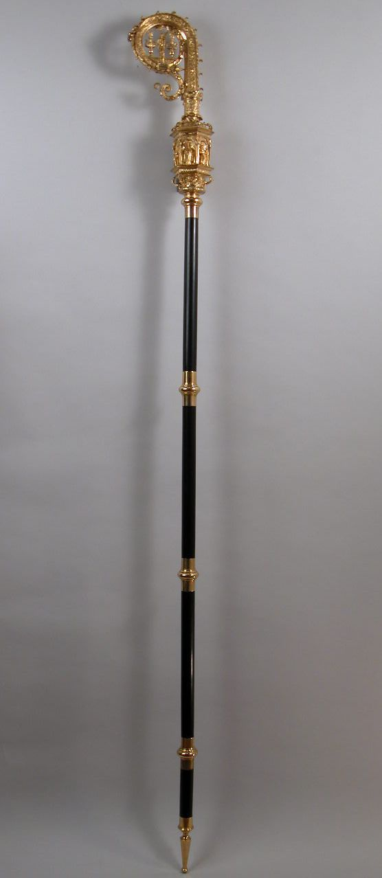 CROSSE VAN DE STAF VAN DE BISSCHOP VAN DEVENTER Antwerpen, 1570 OKM m161 Deze crosse van een staf werd in 1570 vervaardigd voor de franciscaan Aegidius de Monte, die in dat jaar bisschop van Deventer werd. De crosse is tot in de jaren tachtig gebruikt door de oud-katholieke bisschop van Deventer. Op de nodus ziet men in nissen verguld zilveren beeldjes van heiligen, o.a. Aegidius en Franciscus. Bovenin de krul staat Lebuïnus, patroon van Deventer. De Latijnse tekst op de achterzijde betekent: “het is zaliger te geven dan te ontvangen”. De crosse is een zeldzaam fraai voorbeeld van 16de-eeuwse Antwerpse edelsmeedkunst.